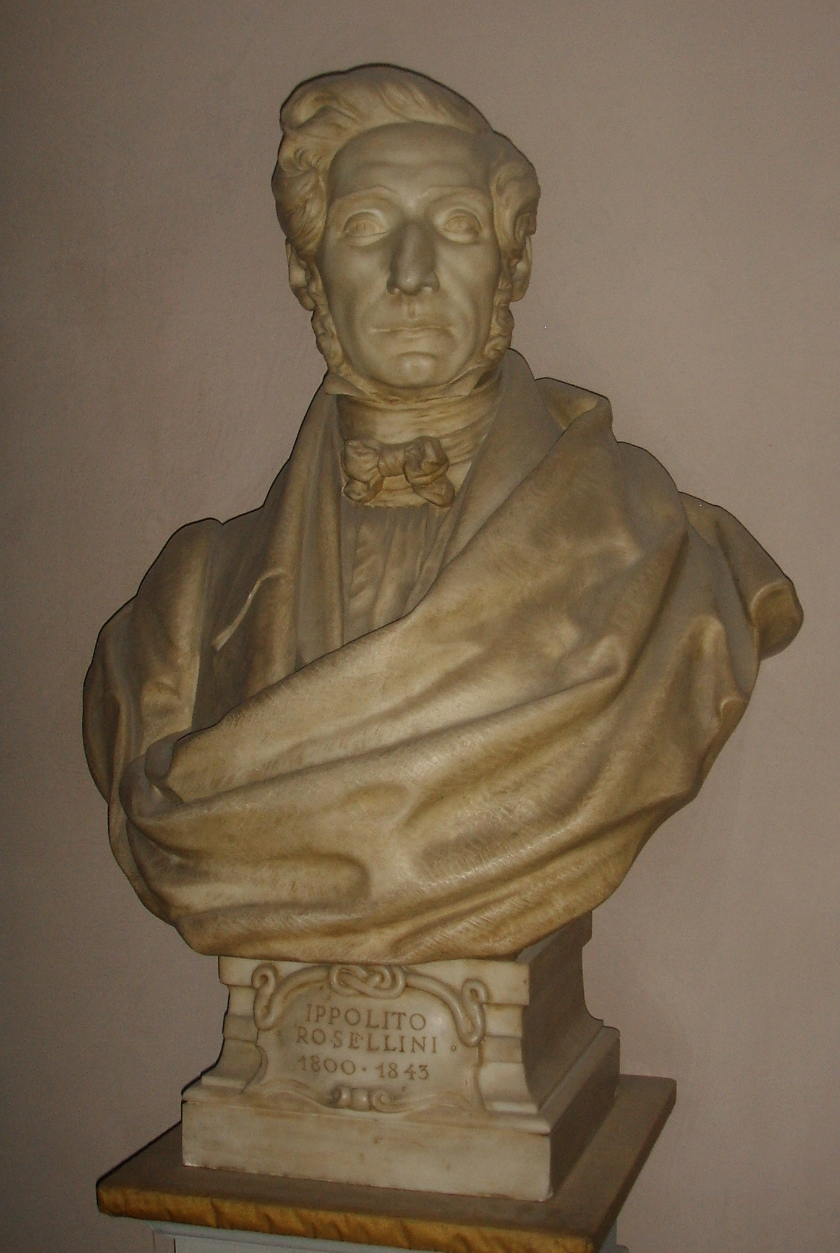 busto_di_Ippolito_Rosellini. Museo archeologico di Firenze museum in Florence